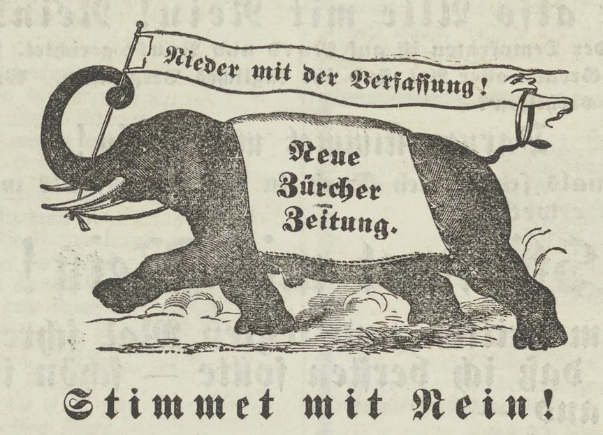 Karikatur im "Züri-Heiri" des Winterthurer Landboten, Verfassungsabstimmung Kanton Zürich 1869